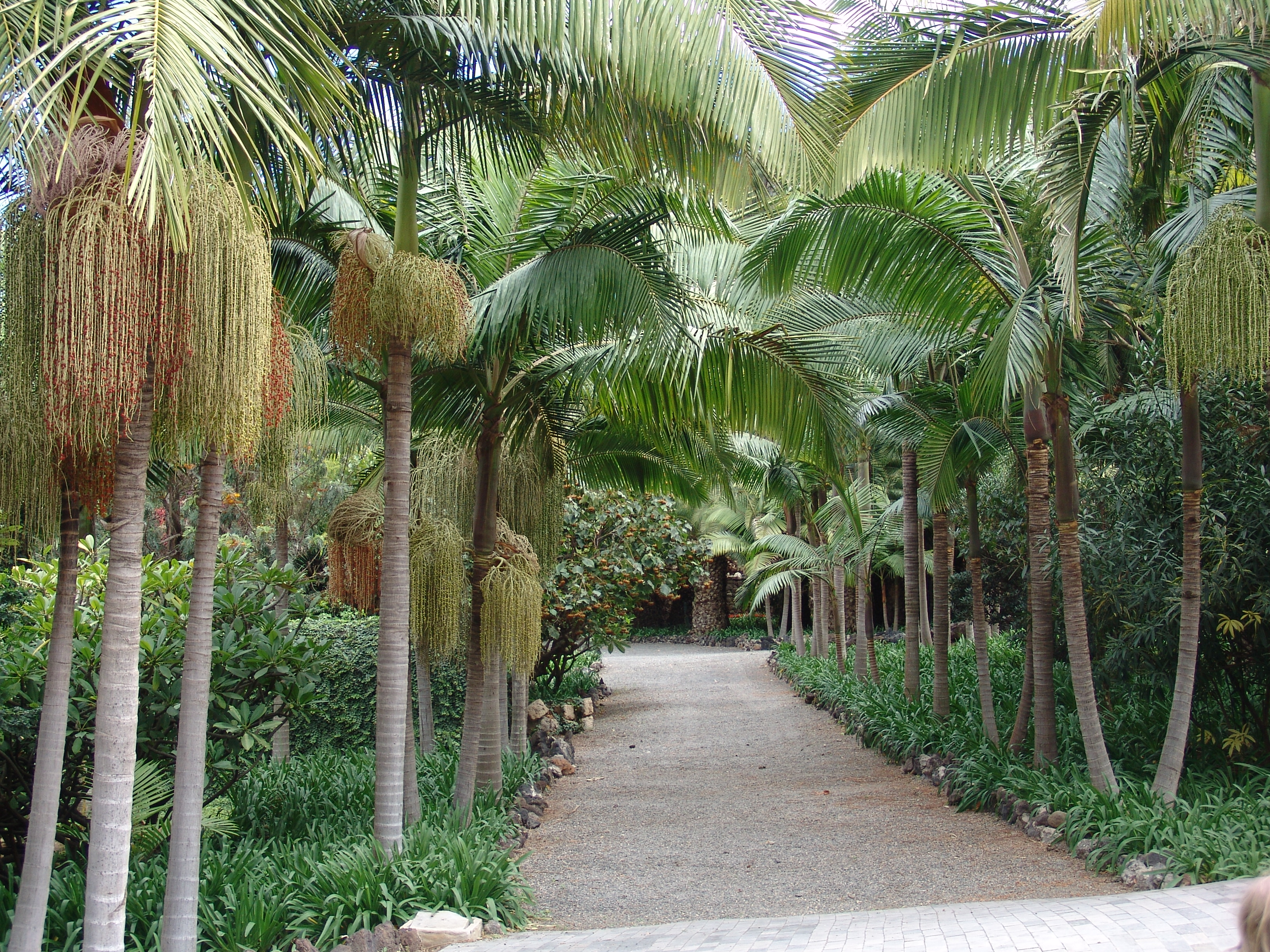 Botanischer Garten der Herzogin von Arucas, Gran Canaria. Kanarischen Inseln. Spanien.